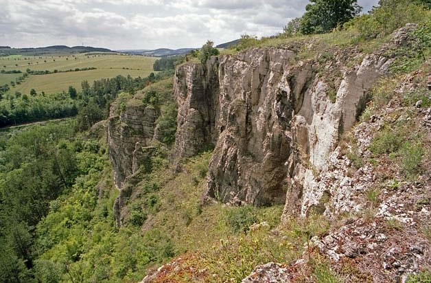 Moje fotografie z Národní přírodní památky Kotýz